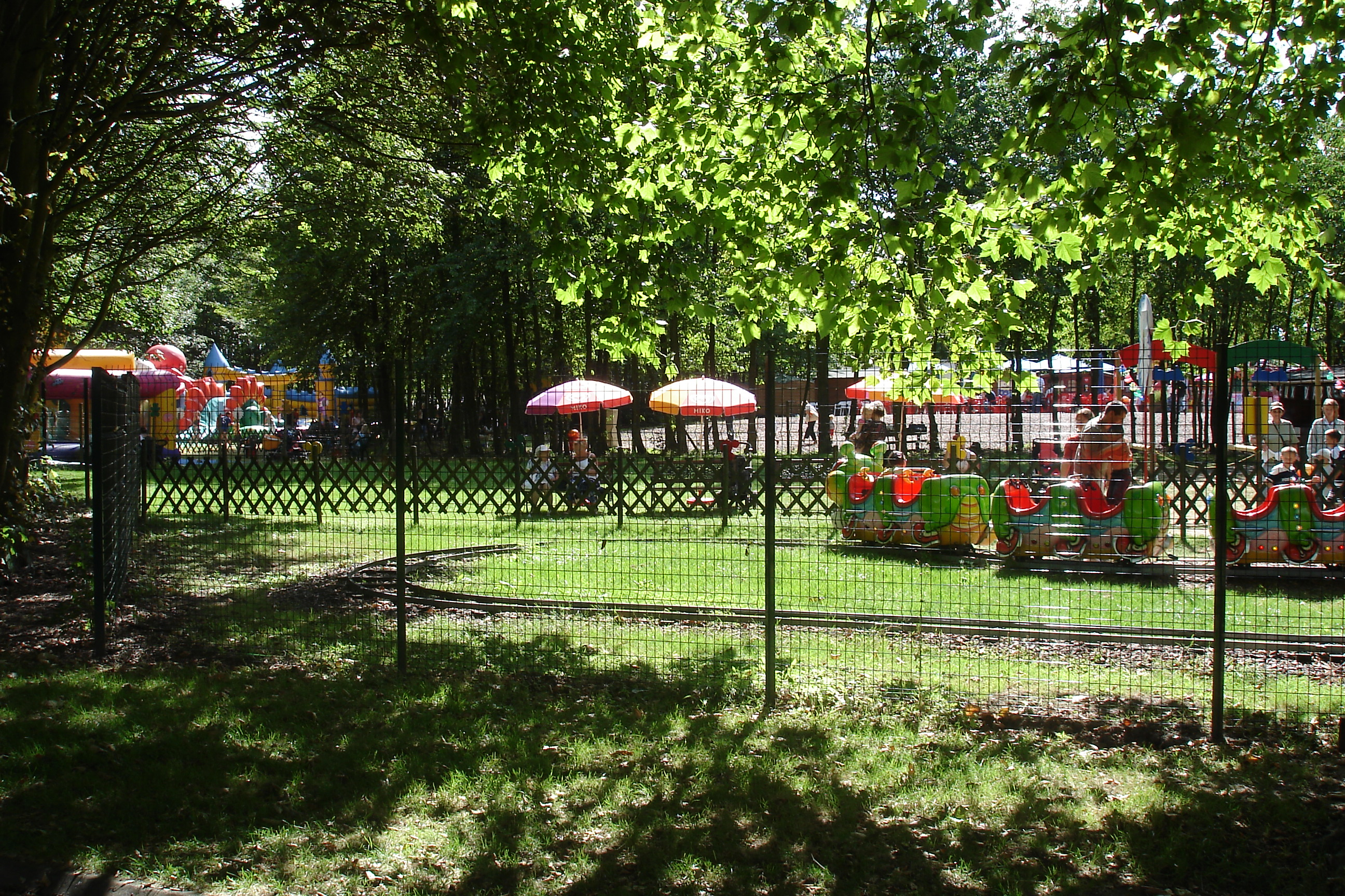 Photo prise par mes soins du parc d'attraction Ch'ti Parc (parc de la glissoire)à Avion 62210 France